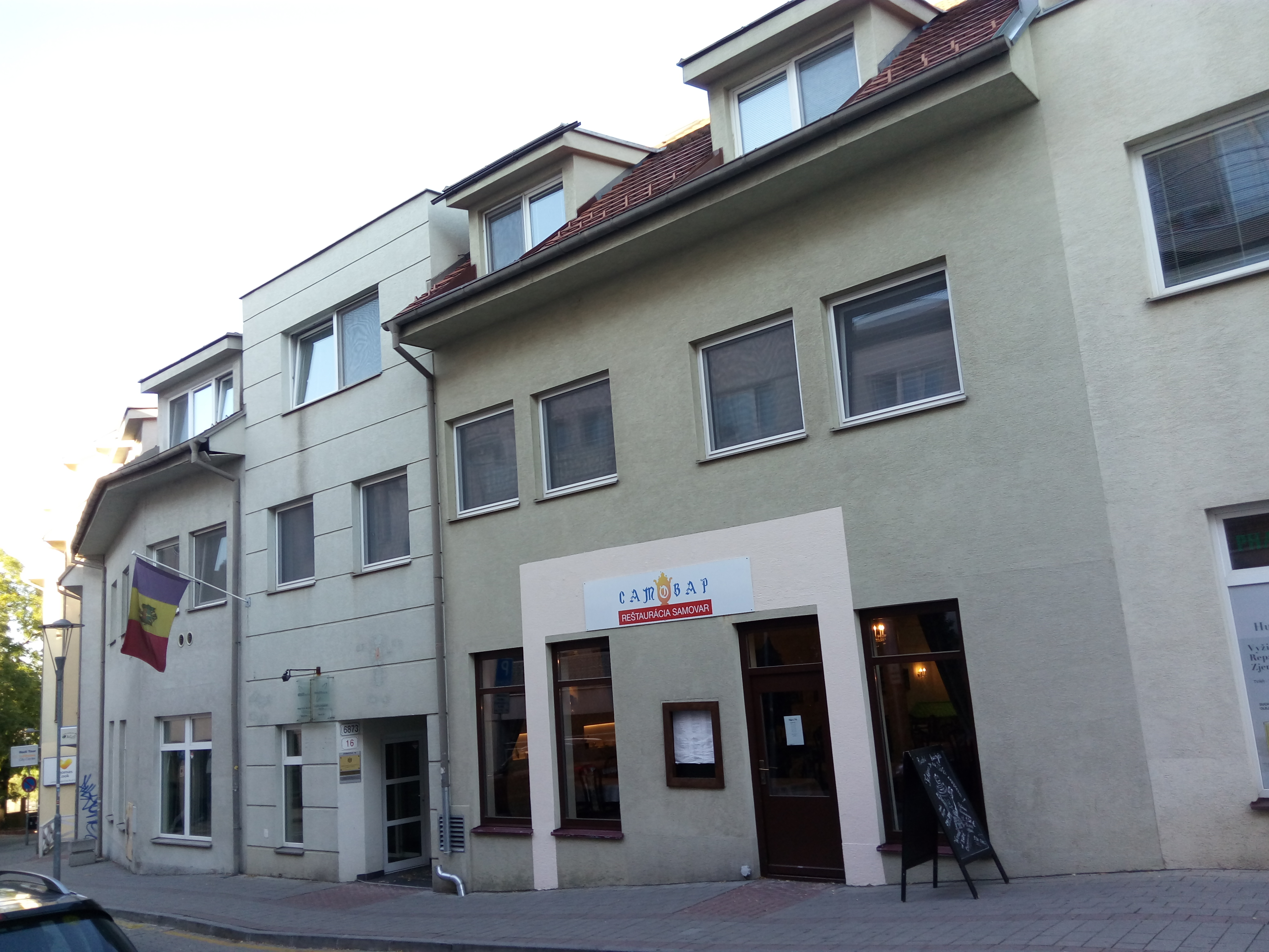 Zámocká 16, Staré Mesto, Bratislava